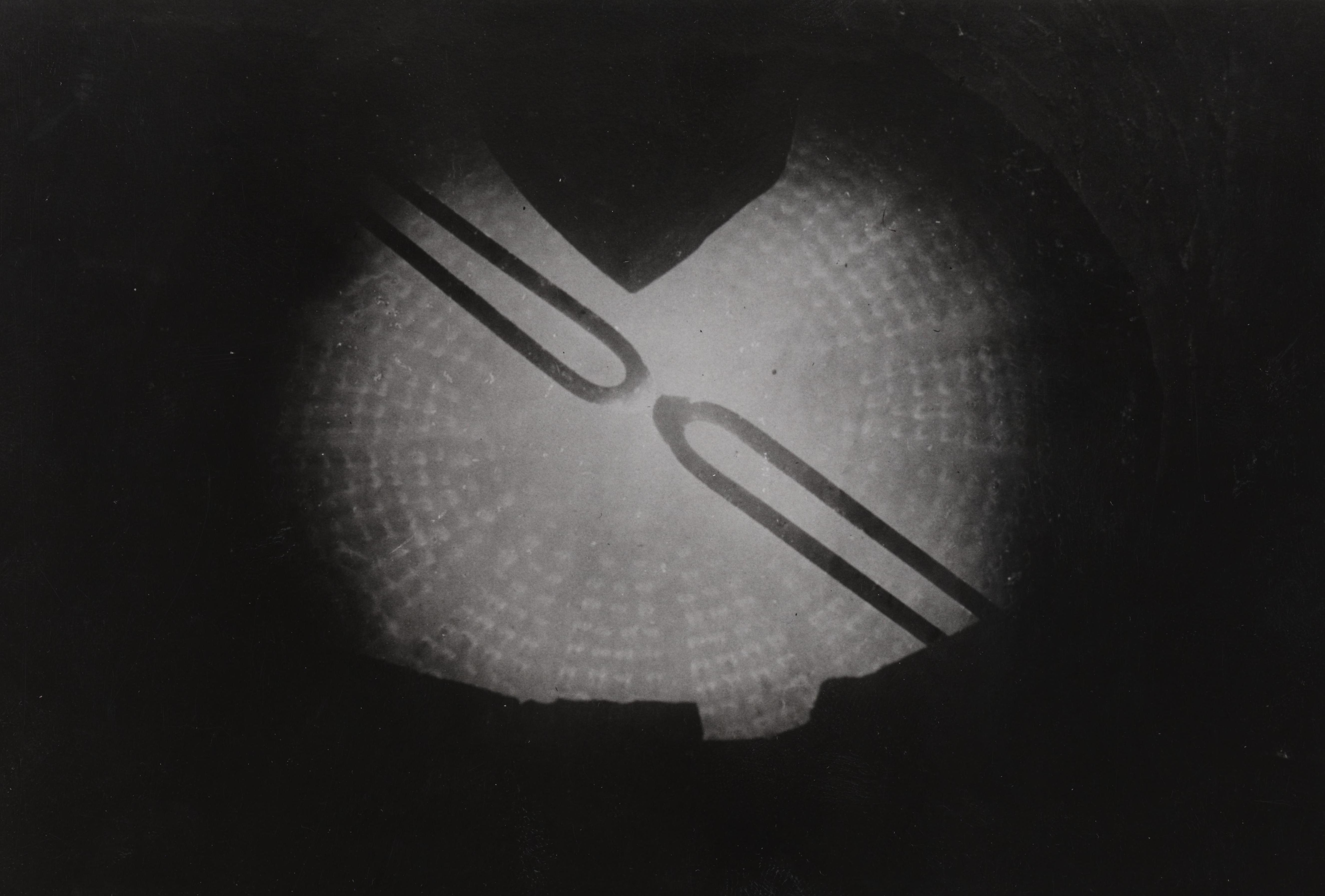 Bildet er hentet fra Nasjonalbibliotekets bildesamling